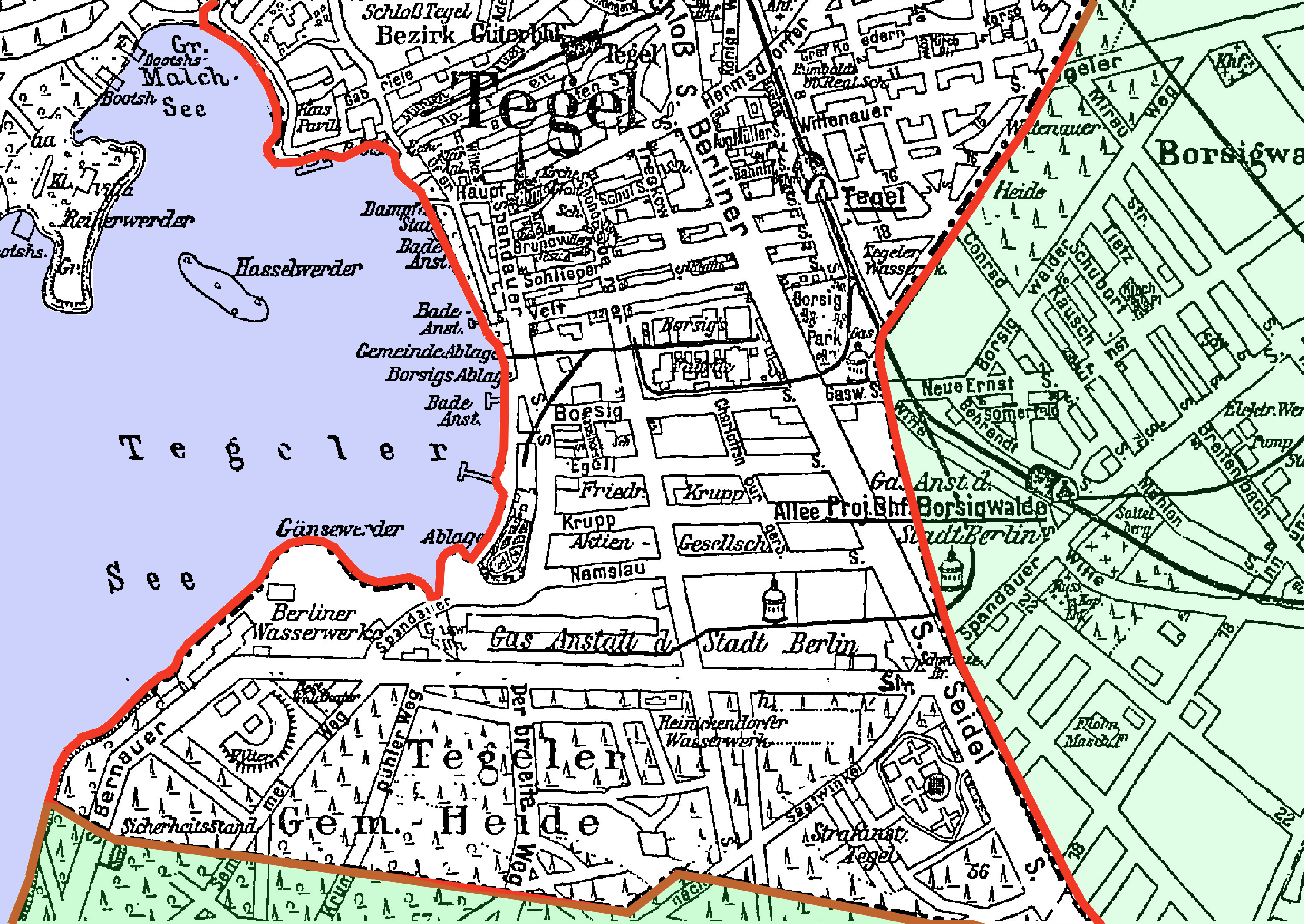 Situation des Straßensystems in Berlin=Tegel im Jahre 1911/1912